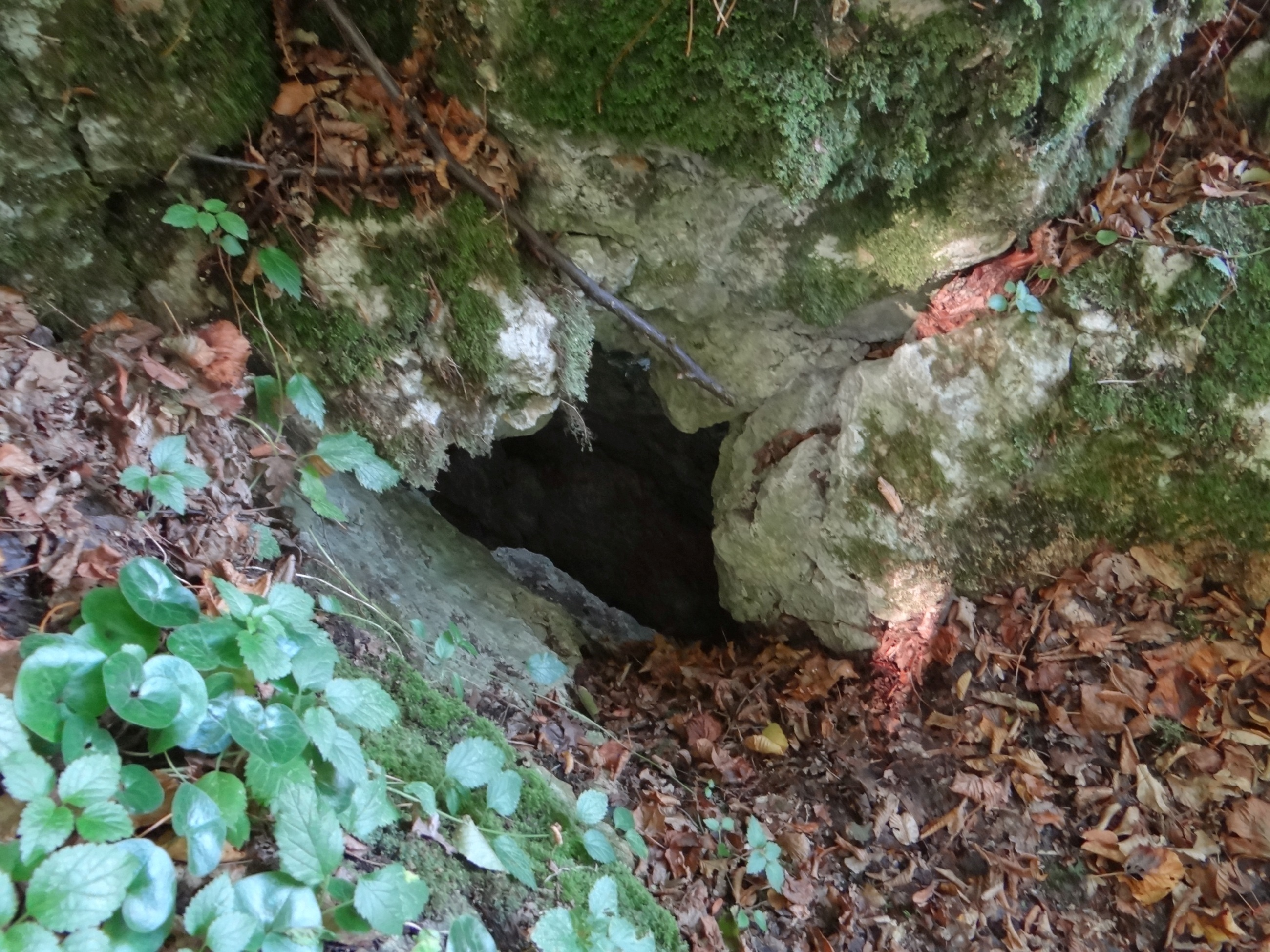 Studnia za Igłą w Skale Gaudynowskiej w dolinie Brodłówki. Otwór boczny